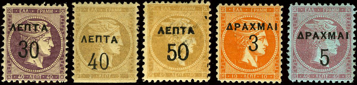 Grosses têtes surchargées - Série courante dentelées